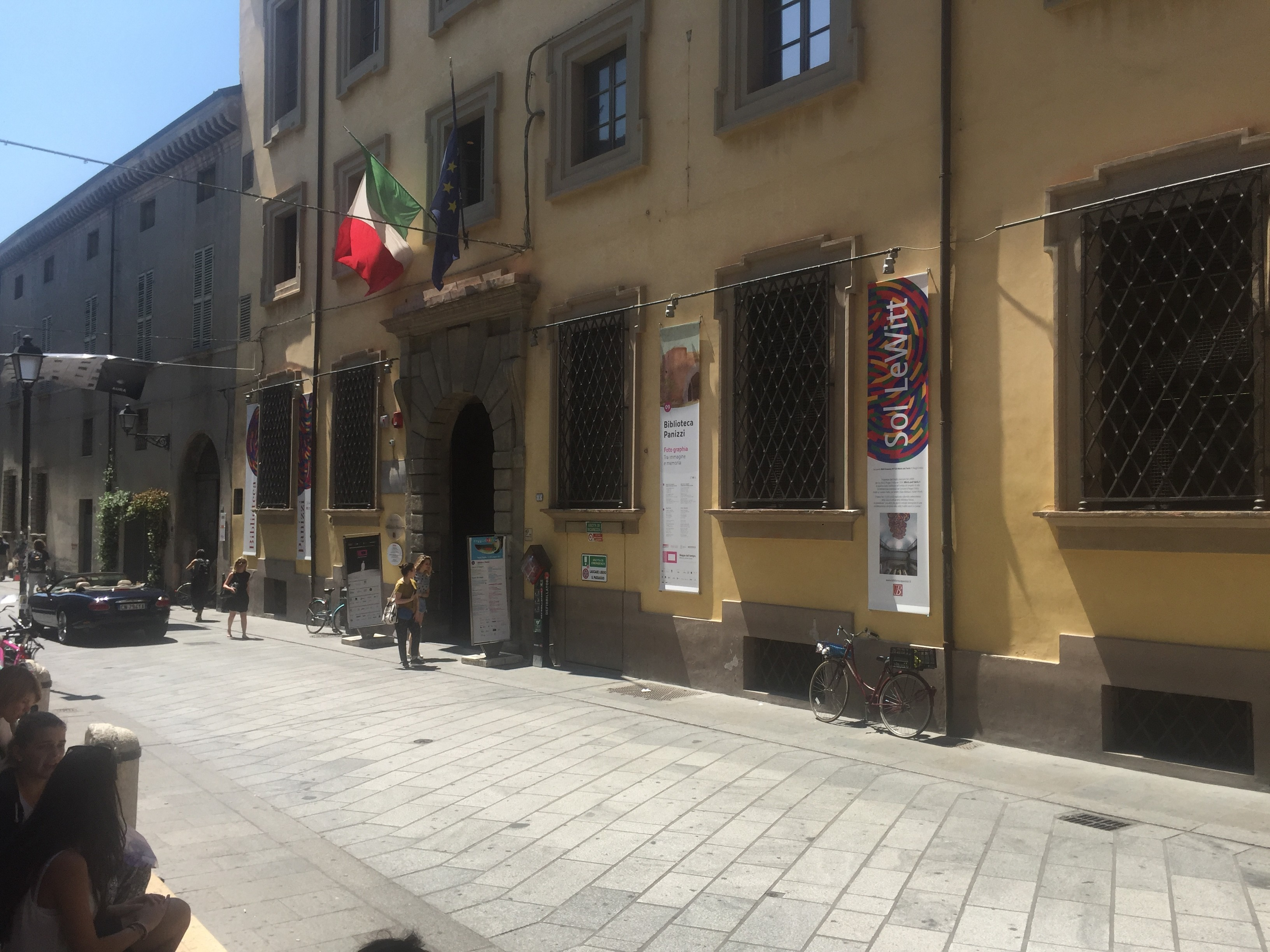 Ingresso Biblioteca Panizzi, via Farini 3, Reggio Emilia